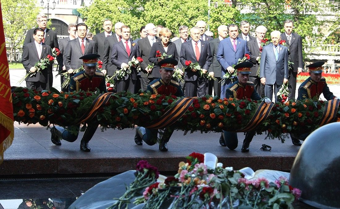 Возложение цветов к Могиле Неизвестного Солдата.